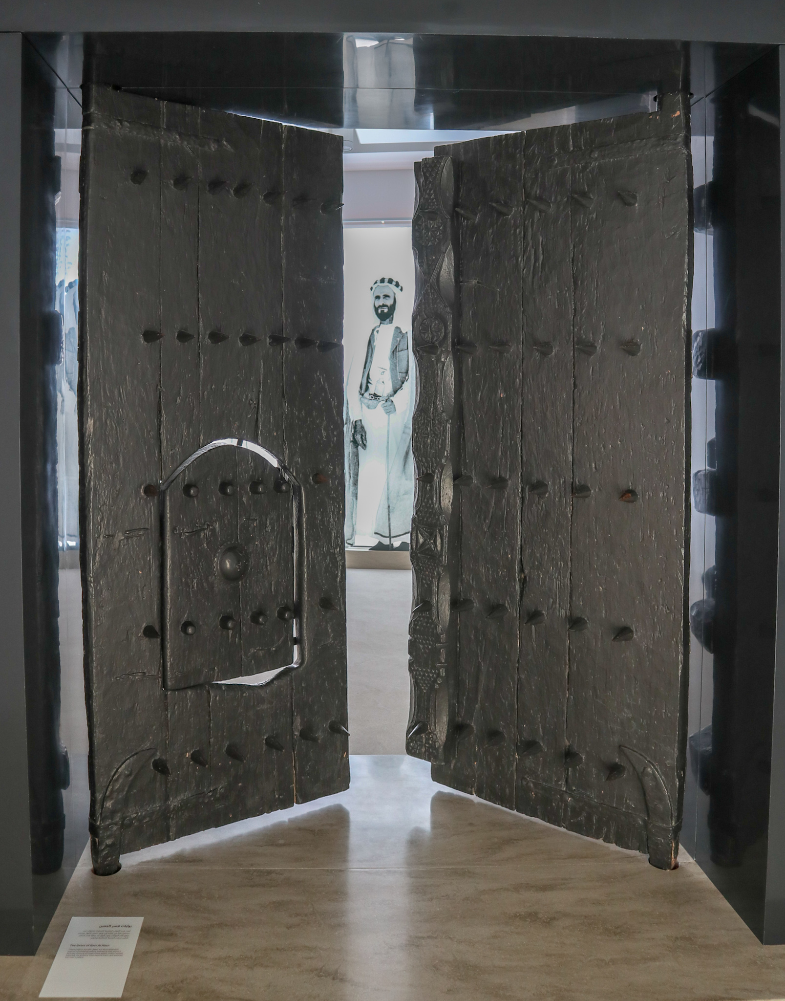 Im Museum